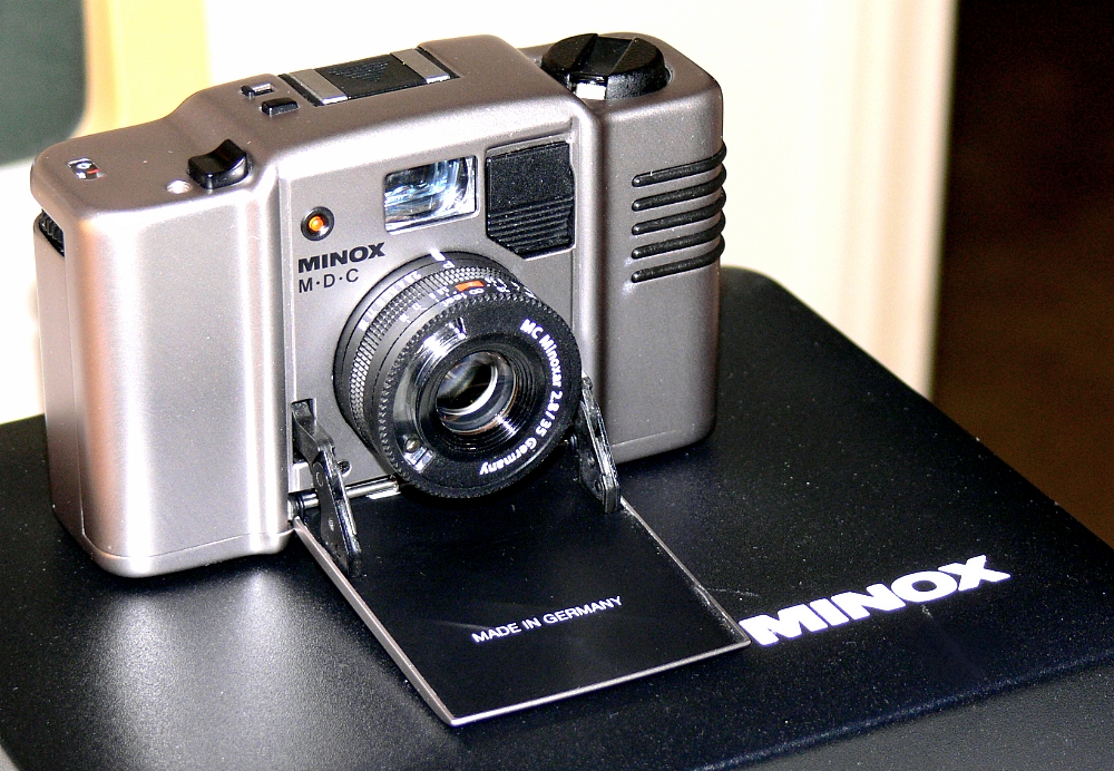 Minox M.D.C 35mm camera